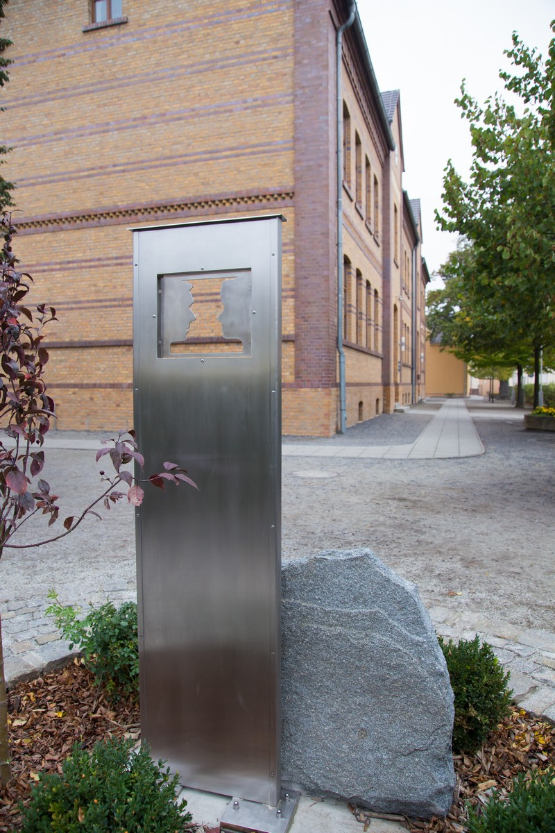 Geschwister-Scholl-Gedenkstätte Schule Ruhland, Einweihung 15.10.2016